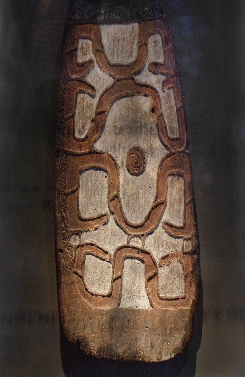 Asmat-Schild (A1934) Asmatschild